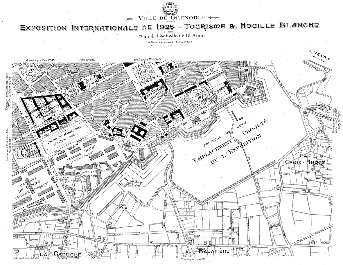 Plan d'Exposition internationale de la houille blanche de Grenoble de 1925. Site du polygone du génie, futur emplacement du parc Paul Mistral. Au nord le Jardin des Plantes et l'Orangerie. A gauche, les casernes militaires avec l'Atelier du Génie. A droite, le quartier de la Croix-Rouge, en bas le quartier de La Bajatière encore peu urbanisé.